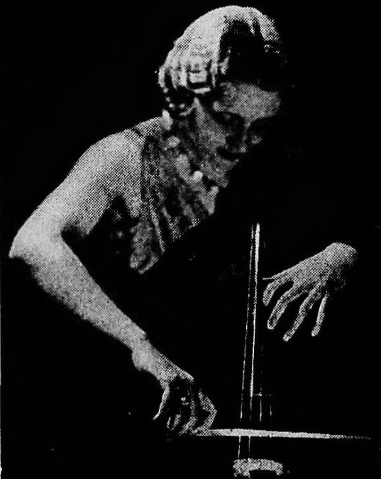 Lucienne Radisse et son violoncelle (1932)